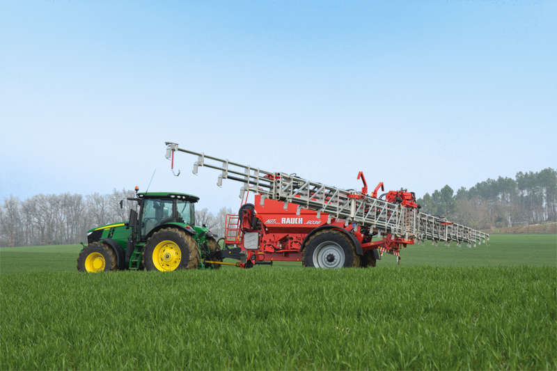 RAUCH pneumatischer Düngerstreuer